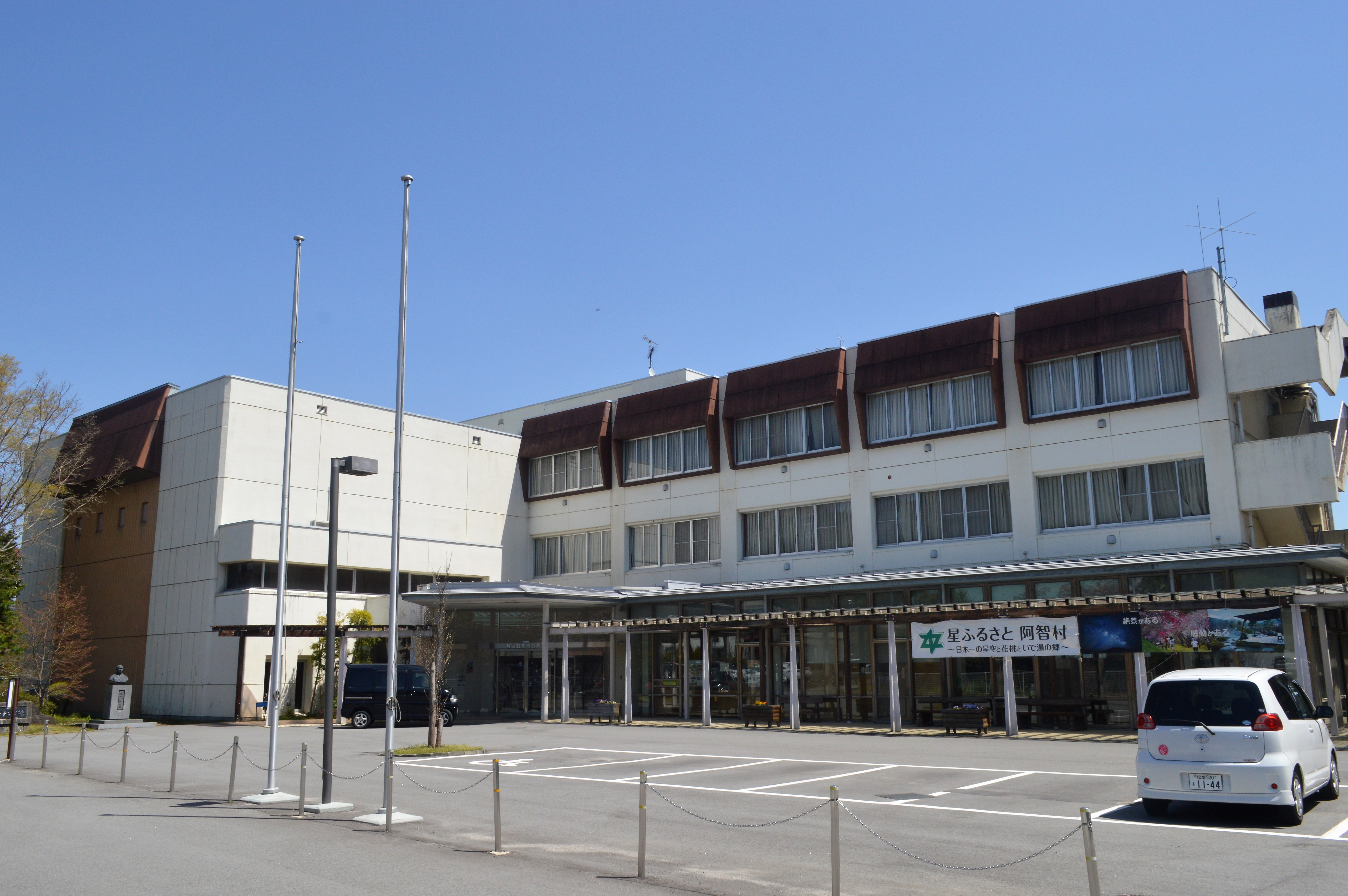 長野県下伊那郡阿智村の阿智村中央公民館。